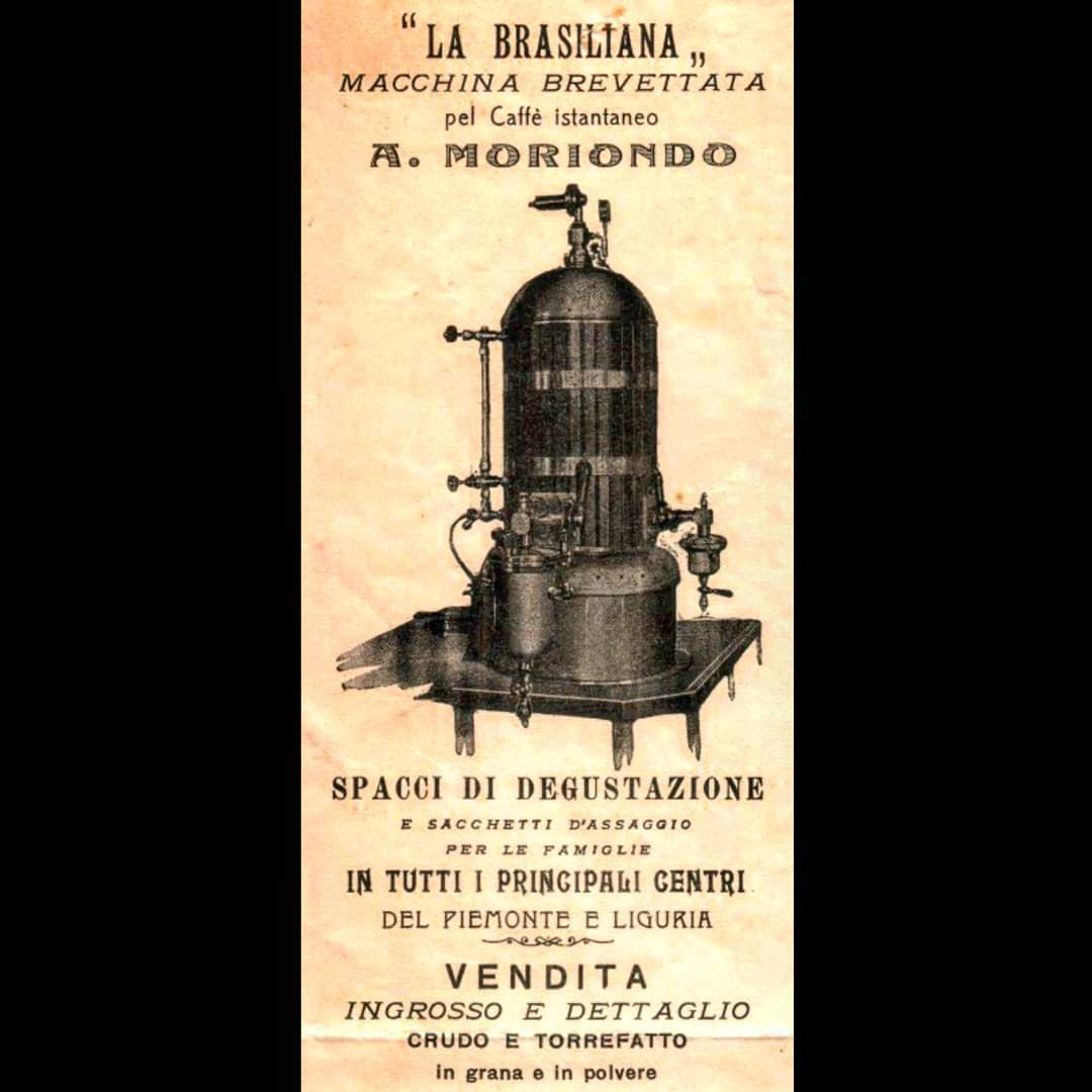 La Brasiliana - La seconda macchina brevettata da Angelo Moriondo